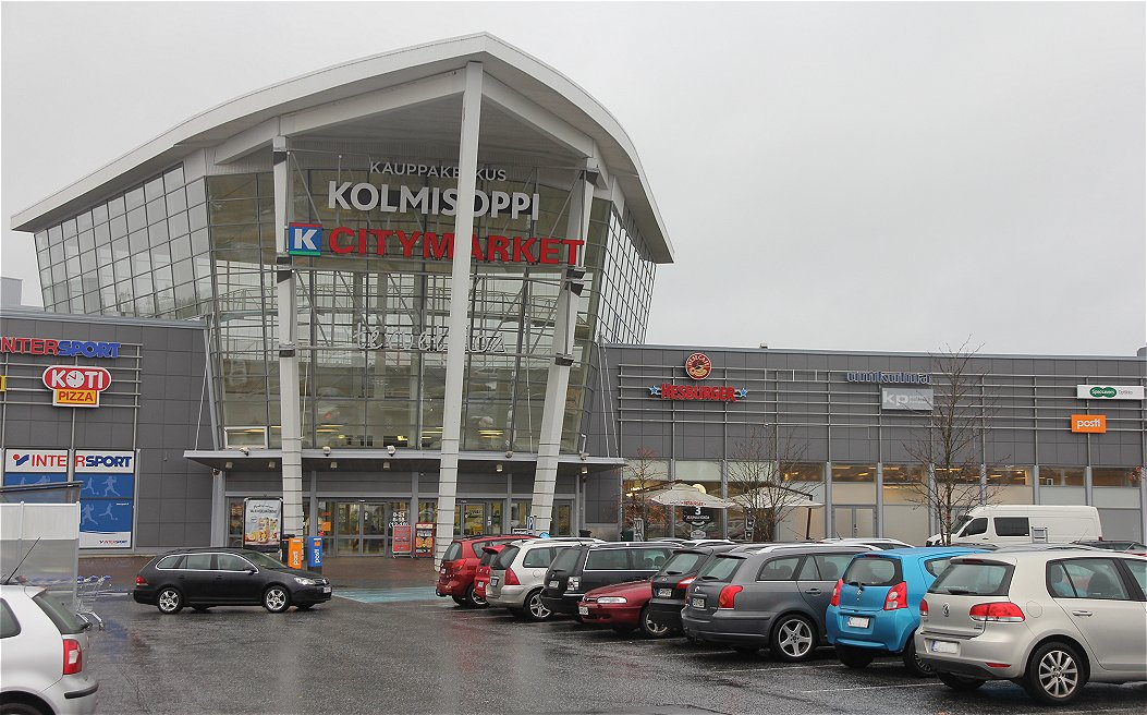 Pääsisäänkäynti Kauppakeskus Kolmisoppeen. Kauppakeskuksen suurin myymälä on hypermarket K-citymarket Kolmisoppi.